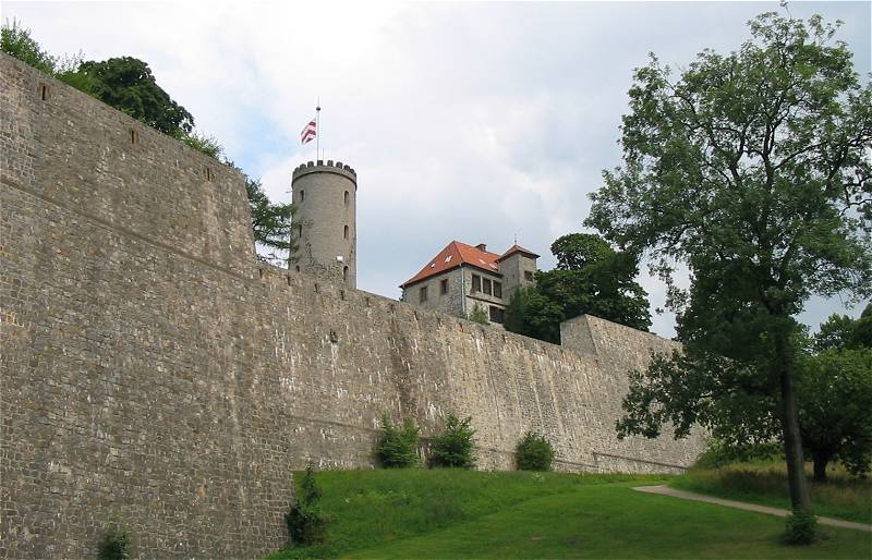 Teil der Sparrenburgfestung in Bielefeld